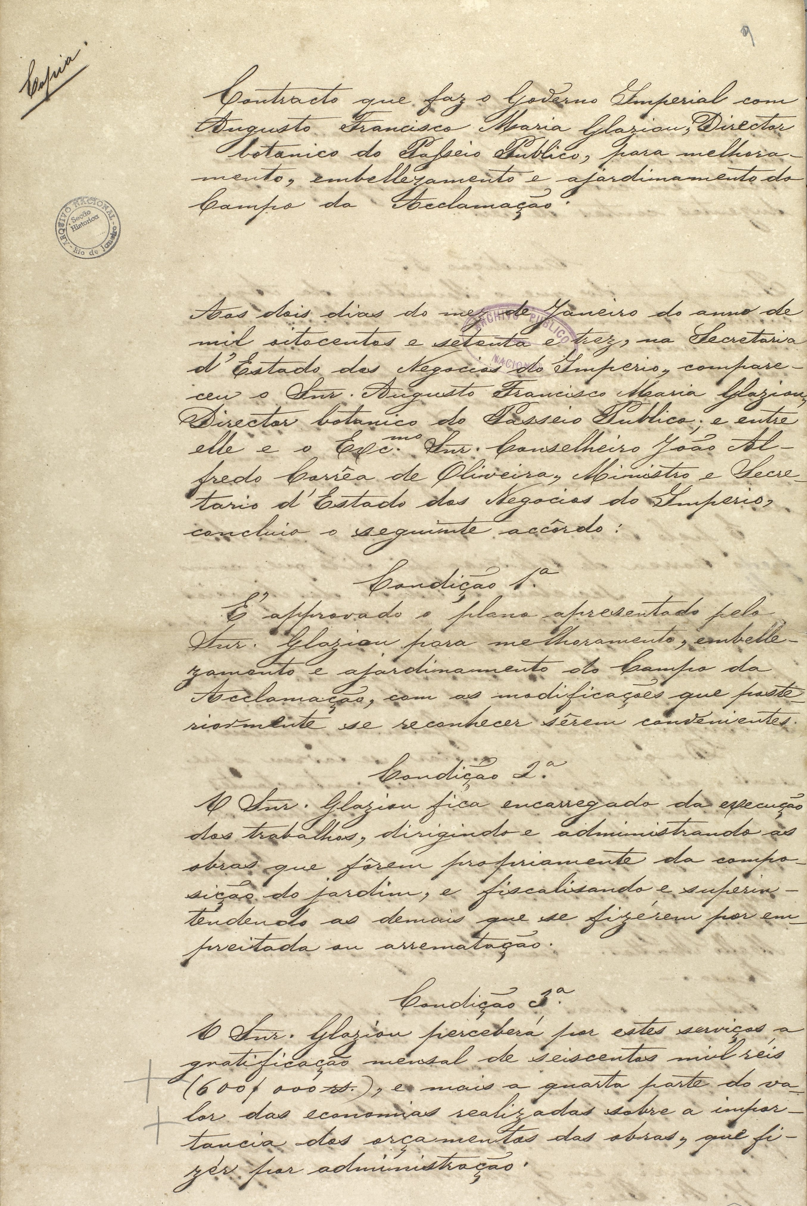 Contrato que faz o Governo Imperial com Augusto Francisco Maria Glaziou, Diretor Botânico do Passeio Público, para melhoramento, embelezamento e ajardinamento do Campo da Aclamação. Fundo: Diversos - SDH - Caixas.